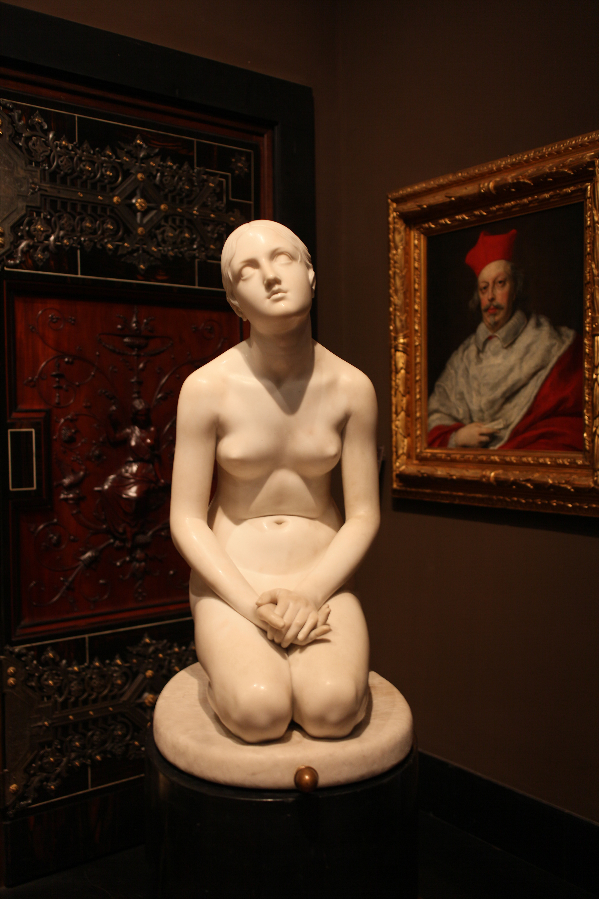 Lorenzo Bartolini (1777-1850) La fiducia in Dio (1833), Museo Poldi Pezzoli, Milano. La scultura fu commissionata a Bartolini dalla nobile Rosina Trivulzio Poldi-Pezzoli alla morte del marito Giovanni e fu realizzata nel 1833. E' parte delle collezioni del Museo Poldi Pezzoli di Milano.